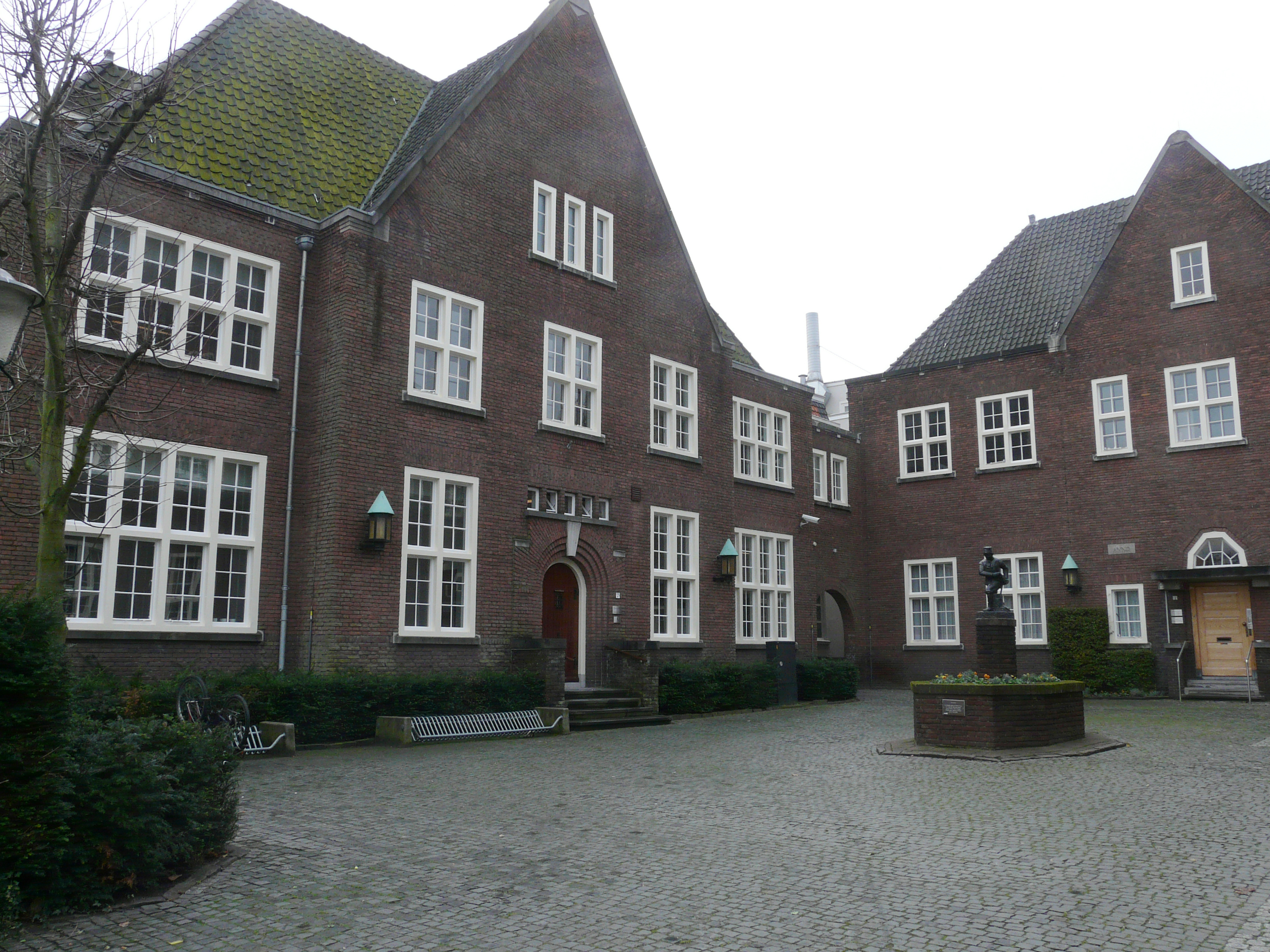 Zicht op achterkant van het Oude Stadshuis aan de Stadserf in Breda Centrum in Breda